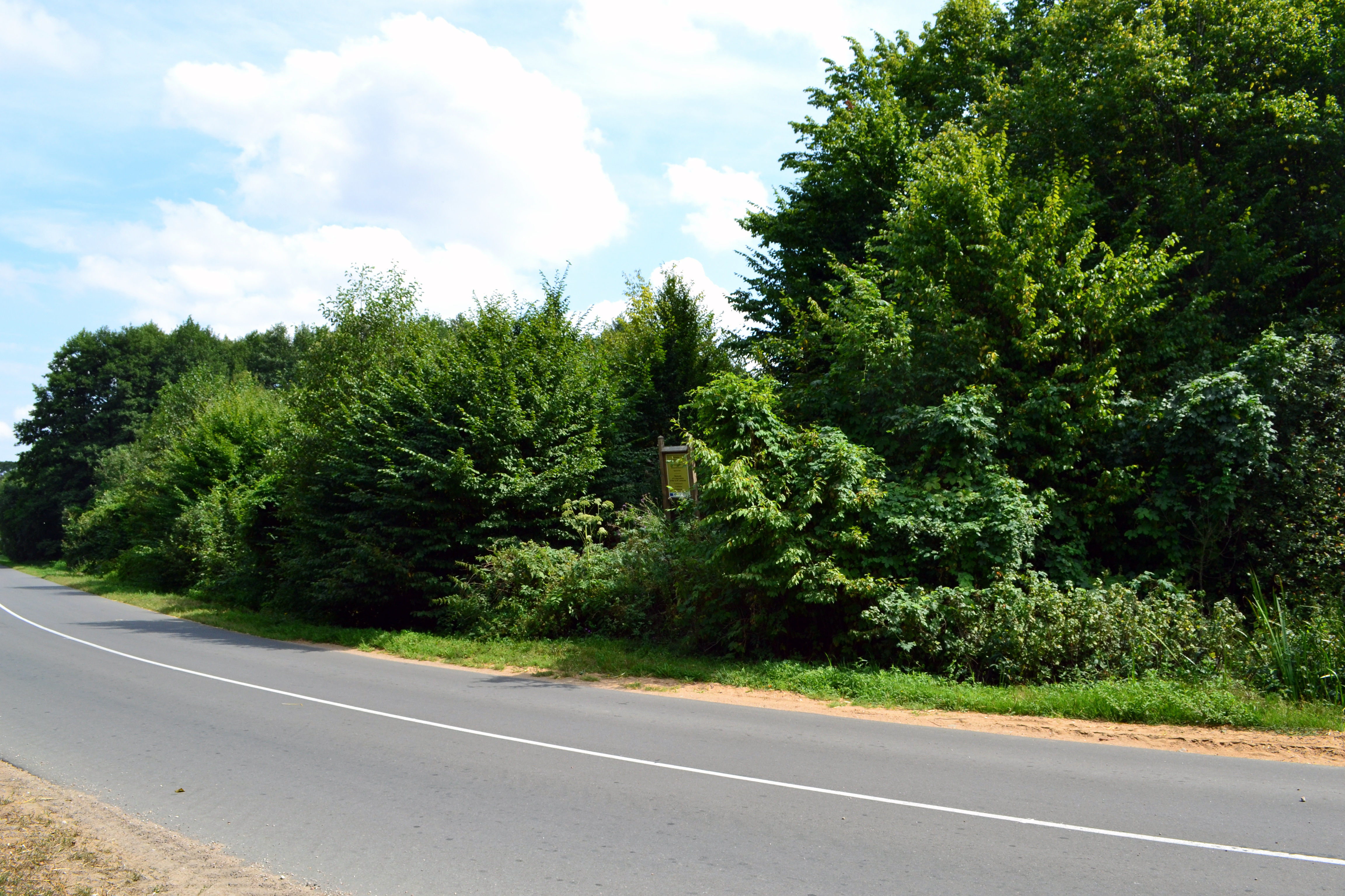 Беларуская (тарашкевіца): Рэшткі Каралеўскага замку ў Лыскаве. Турыстычная таблічка амаль незаўважная з дарогі This is a photo of Belarusian heritage monument. Reference number: 113В000622 ( WLM)